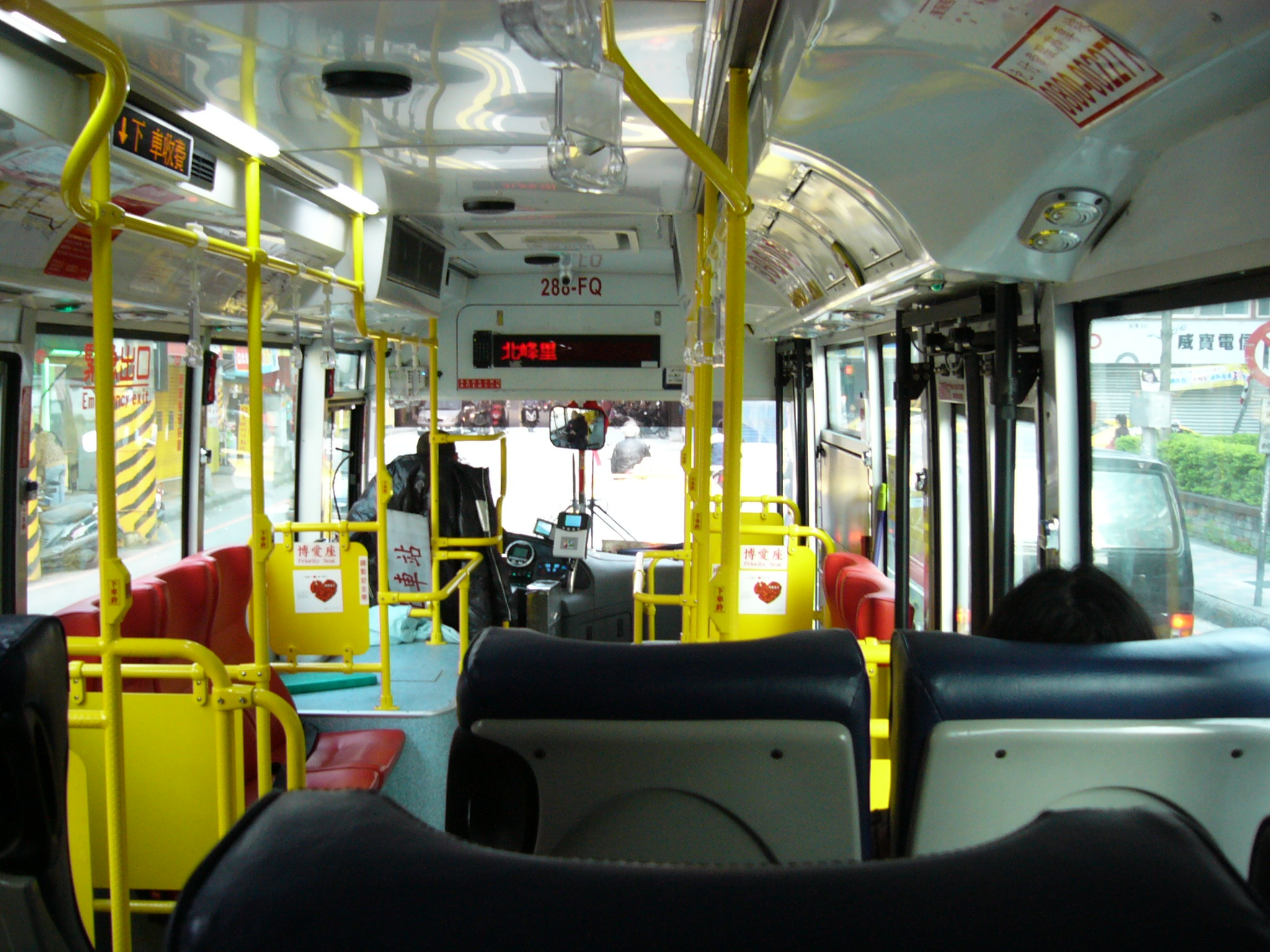 欣和客運288-FQ內裝